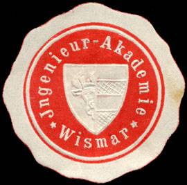 Sealing stamp Title: Ingenieur - Akademie - Wismar Description: rot, weiß, geprägt Place: Wismar size: 3 cm